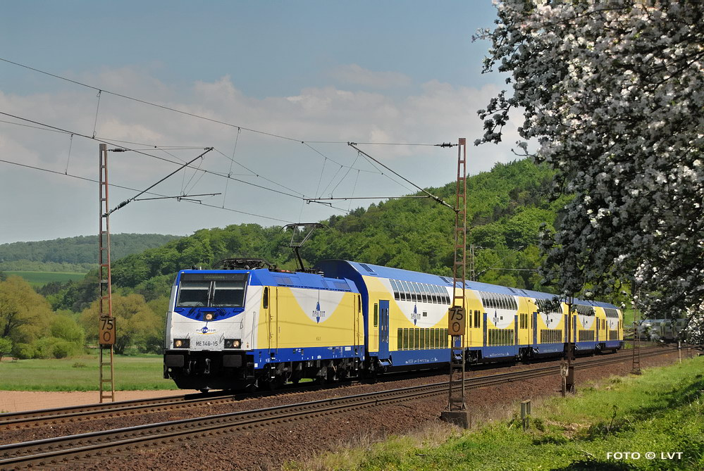 ME146-15